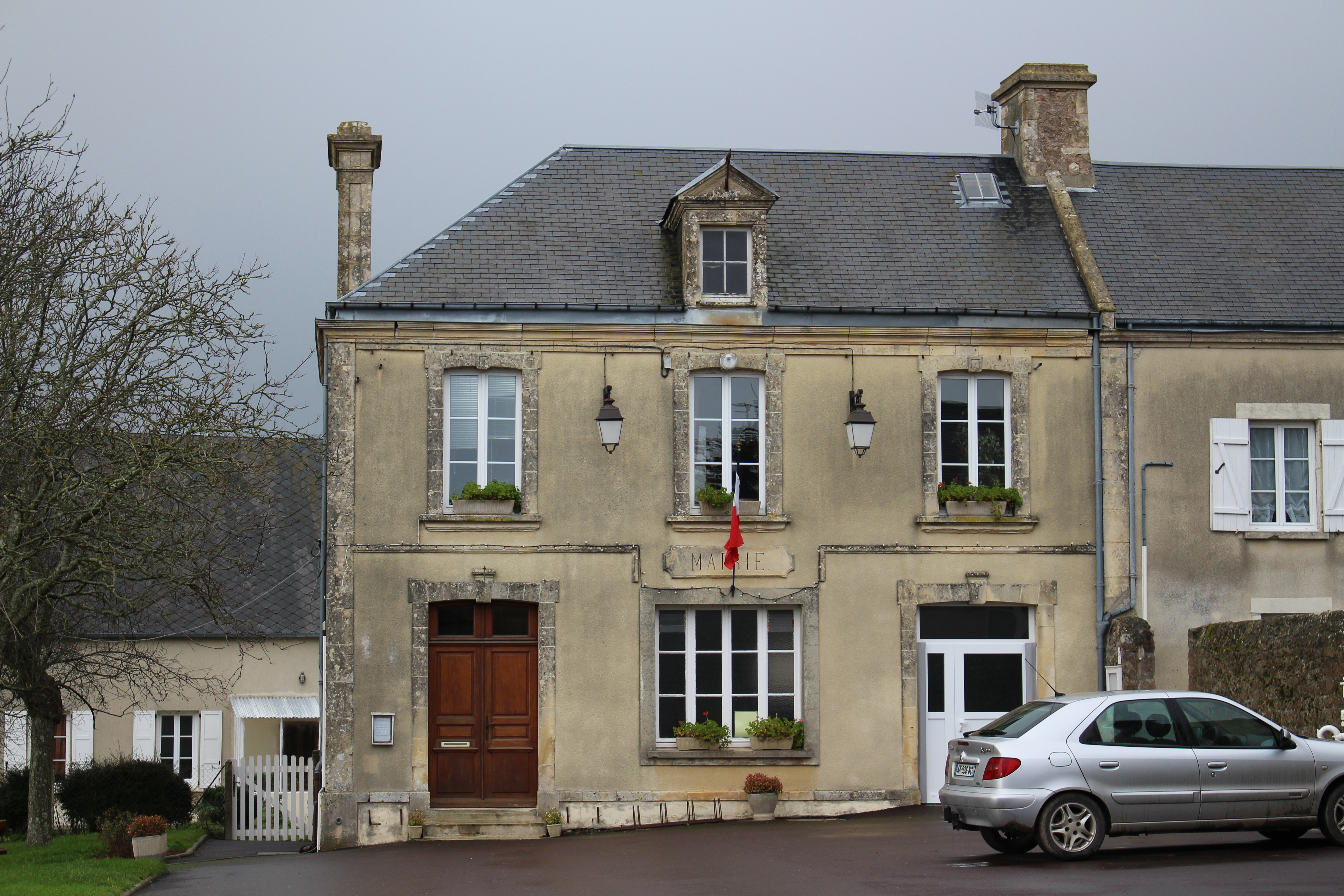 Neuilly-la-Forêt, Calvados